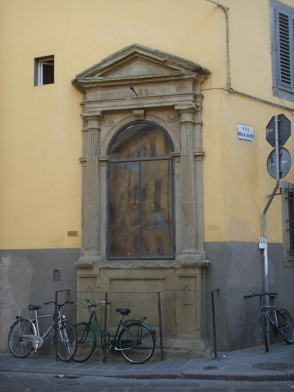 Tabernacolo dei battilani, madonna in gloria con due santi, cerchia di alessandro allori fine XVI secolo